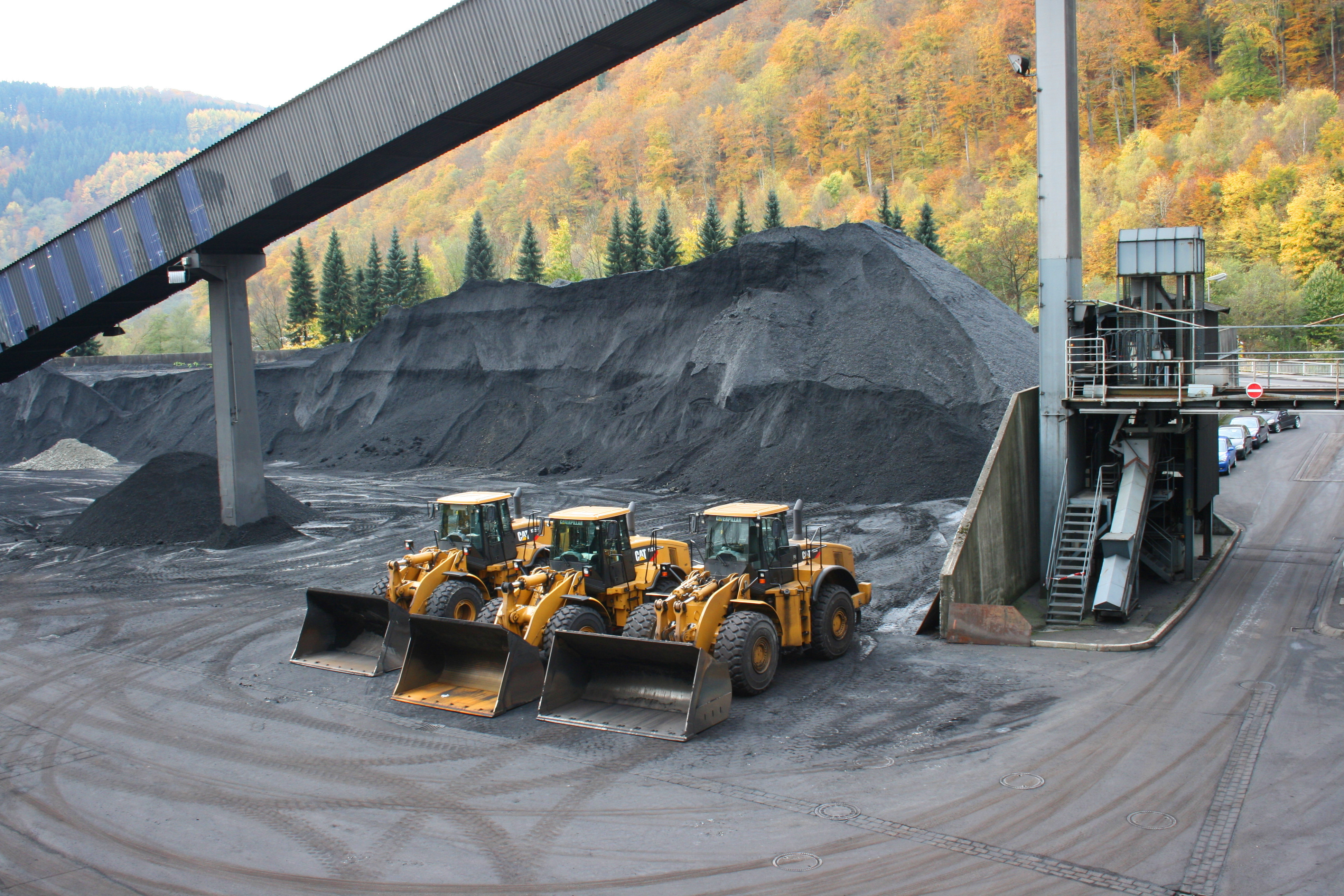 Kohlekraftwerk in Werdohl-Elverlingsen